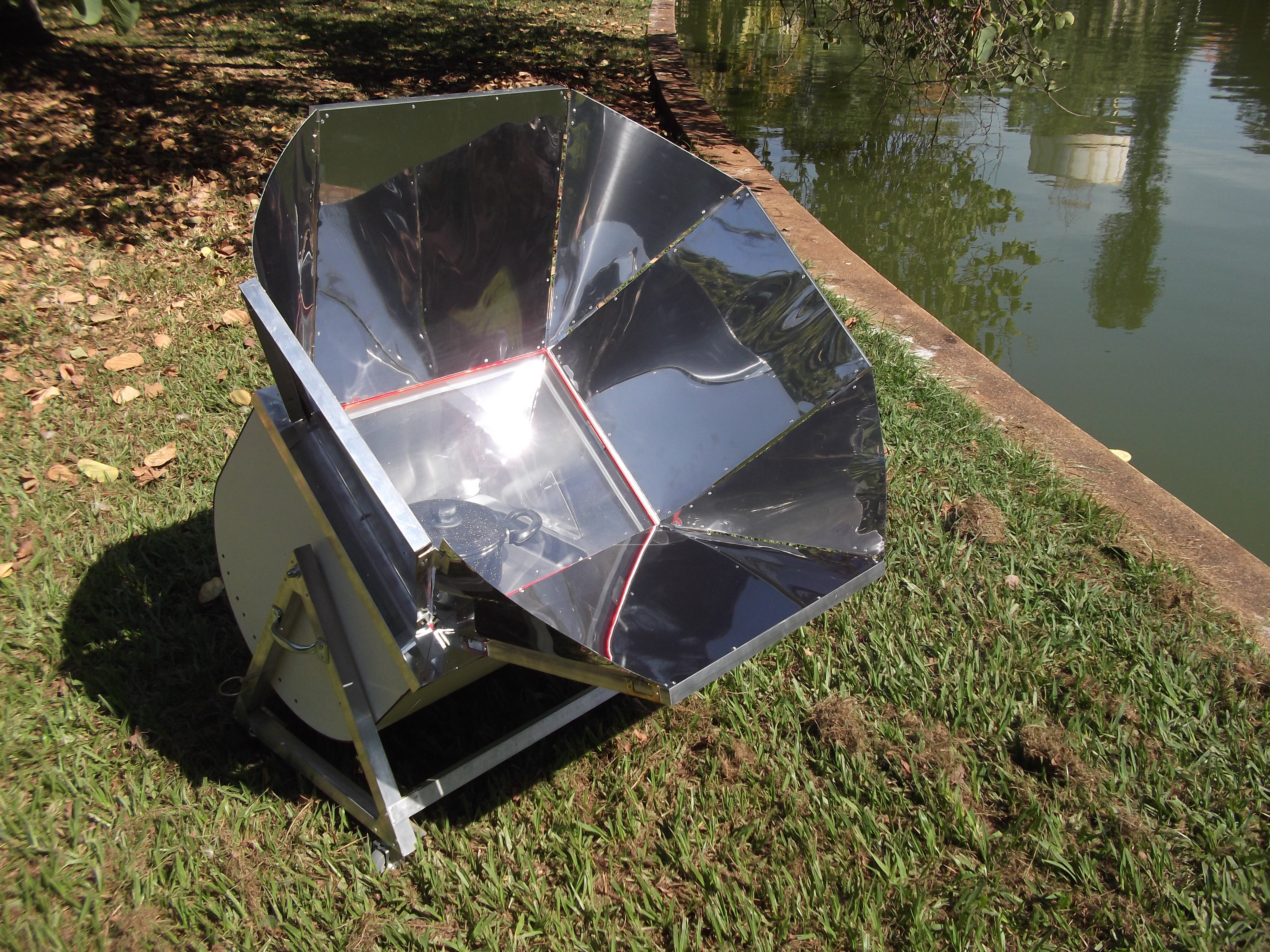 CATASSOL, Forno Solar de alta performance construído pela Pleno Sol no Brasil.